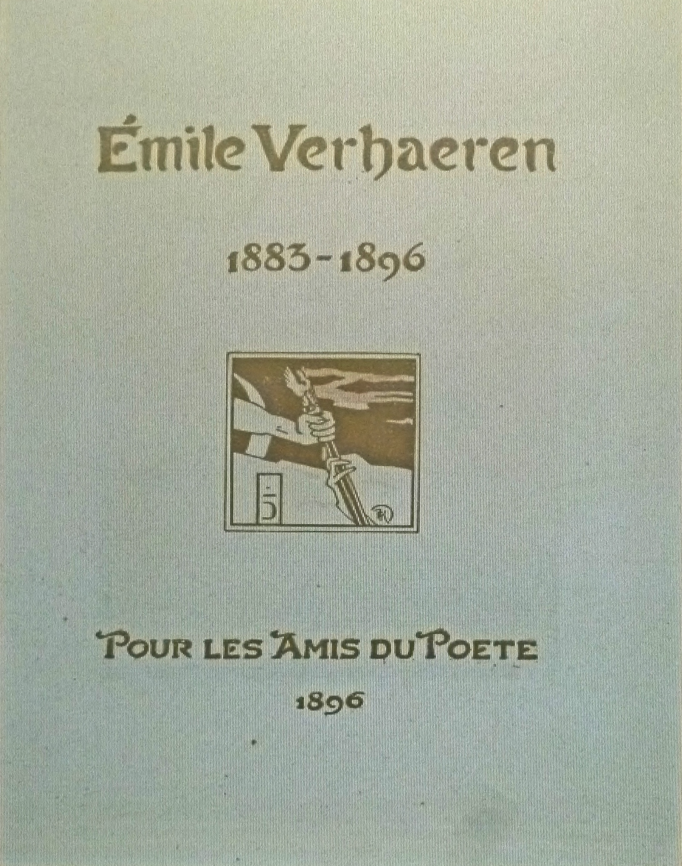 "Pour les Amis du Poète", gedichtenbundel door Emile Verhaeren; ex-libris door Fernand Khnopff